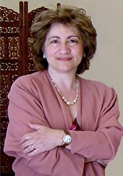 Prof.ssa Adriana Valerio